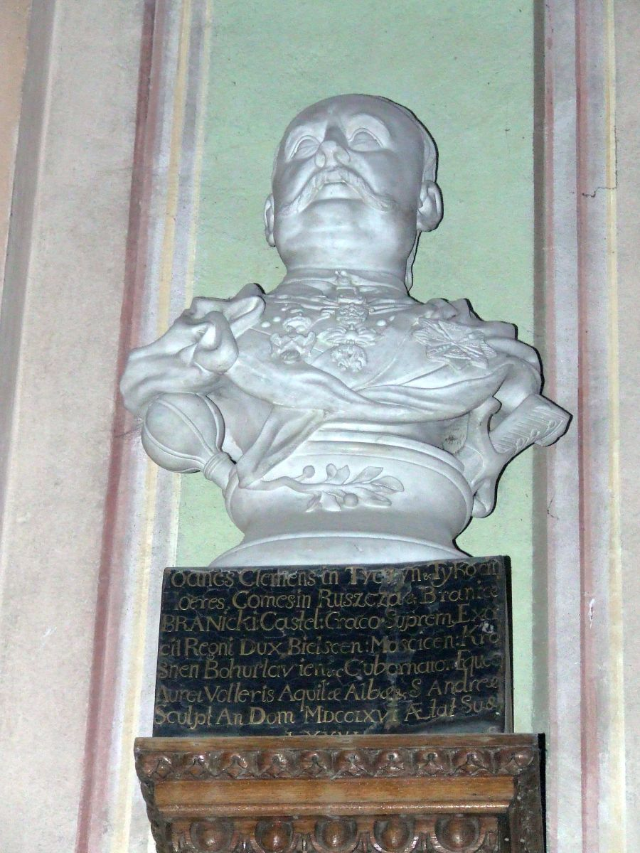 Popiersie Jana Klemensa Branickiego w kościele w Tykocinie, po prawej stronie ołtarza